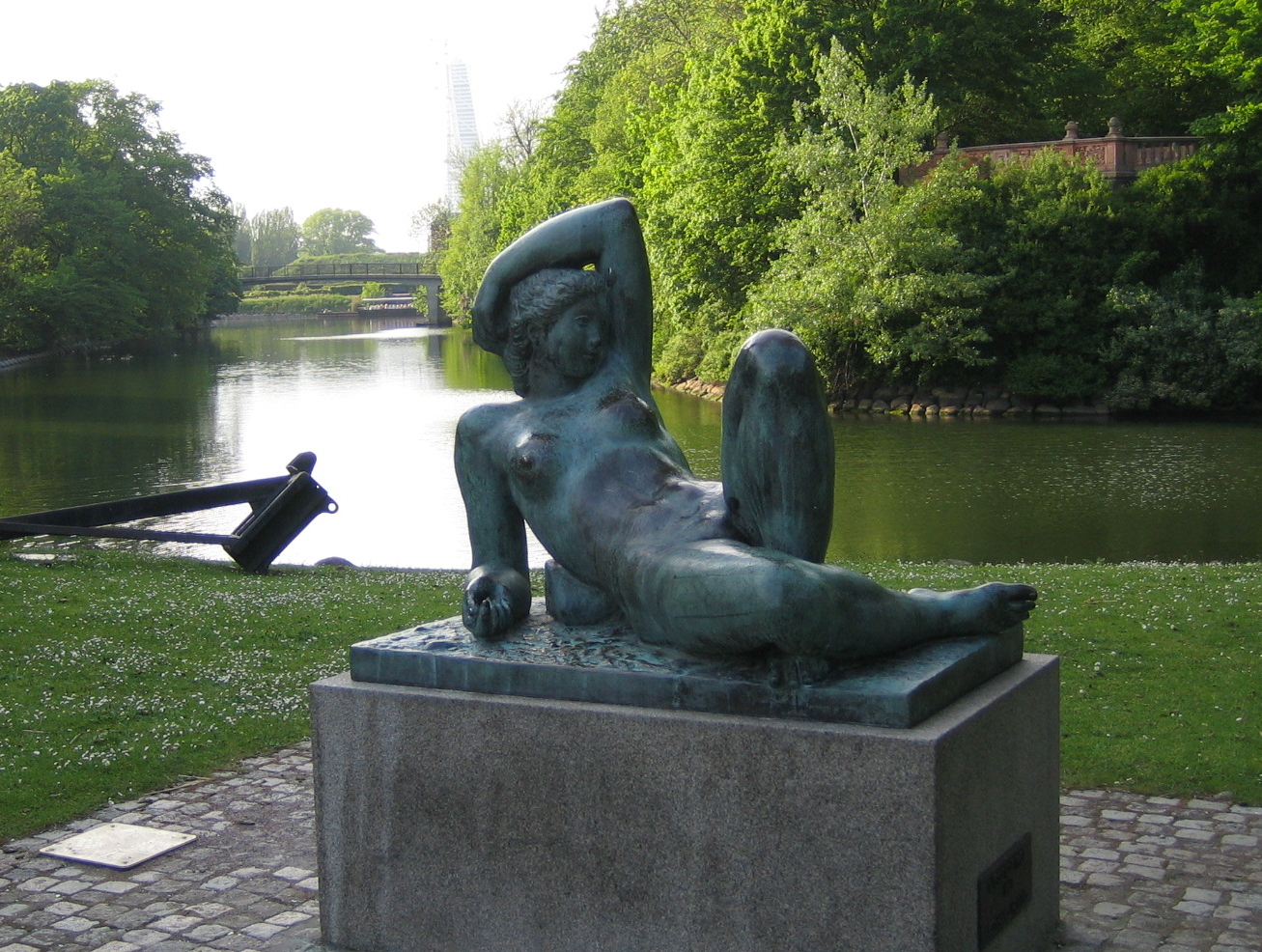 Sculpture "liggende pige" by Gerhard Henning in Slottsparken, Malmö